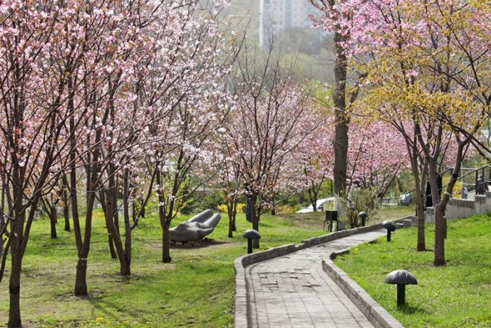 вид весной